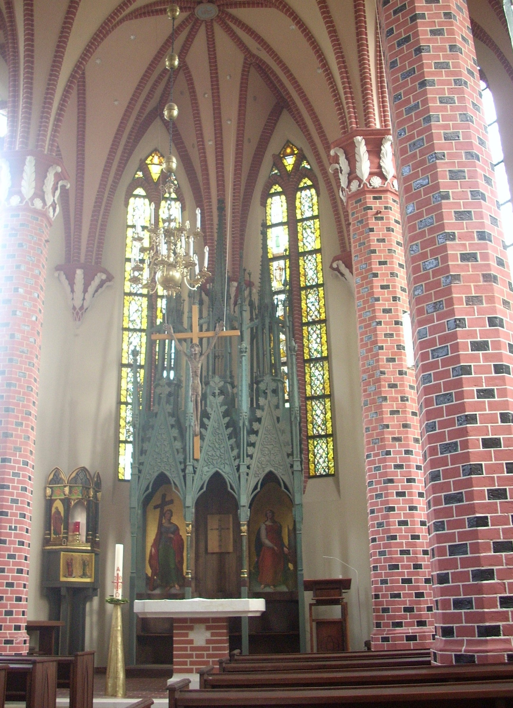 Ludwigslust, Kath. Pfarrkirche St. Helena und Andreas, Altar